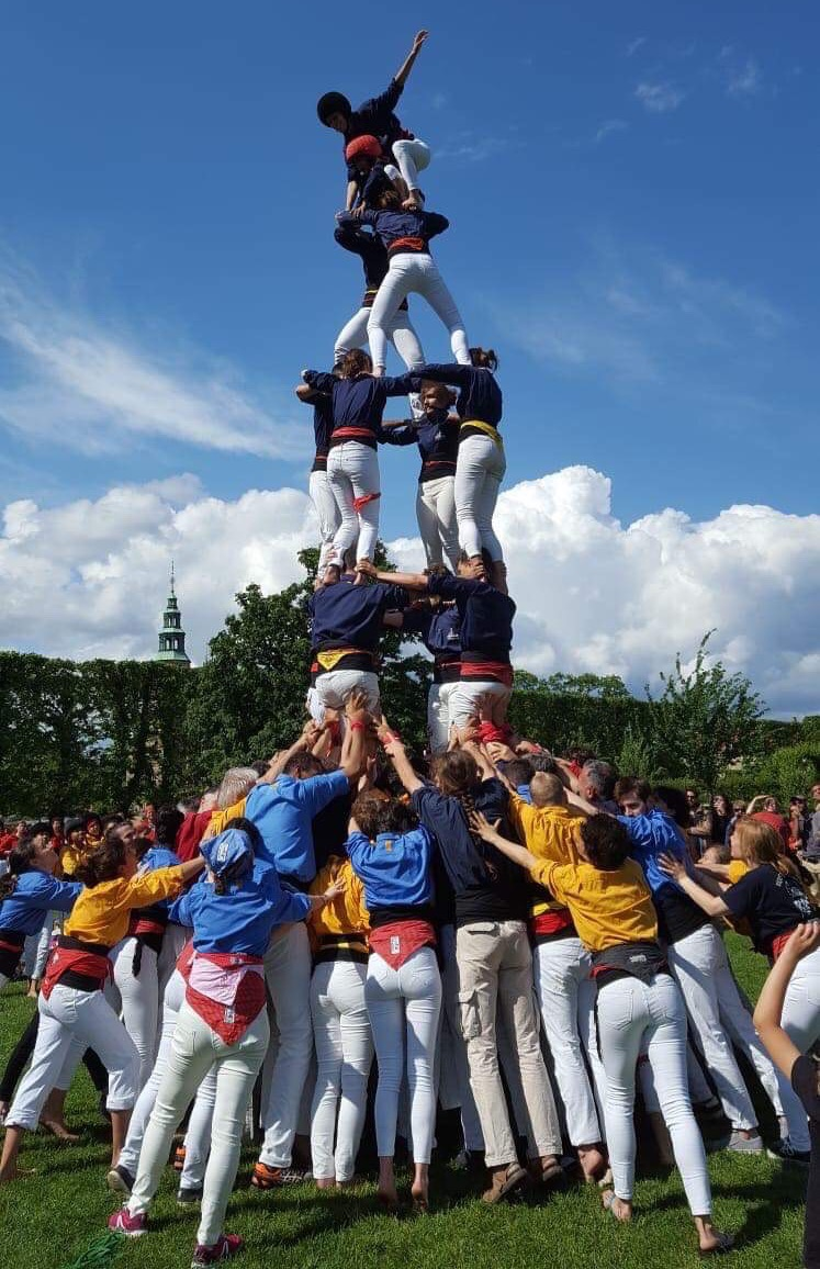 Primer 4d6 de la història dels Xiquets Copenhagen, carregat i descarregat el 9 de juny de 2019 al III Festival Internacional de Castells, celebrat a Copenhaguen (Dinamarca).